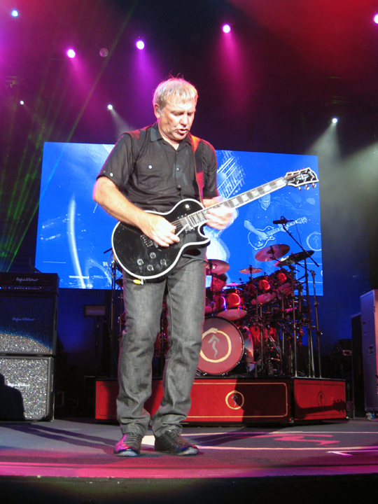 Alex Lifeson